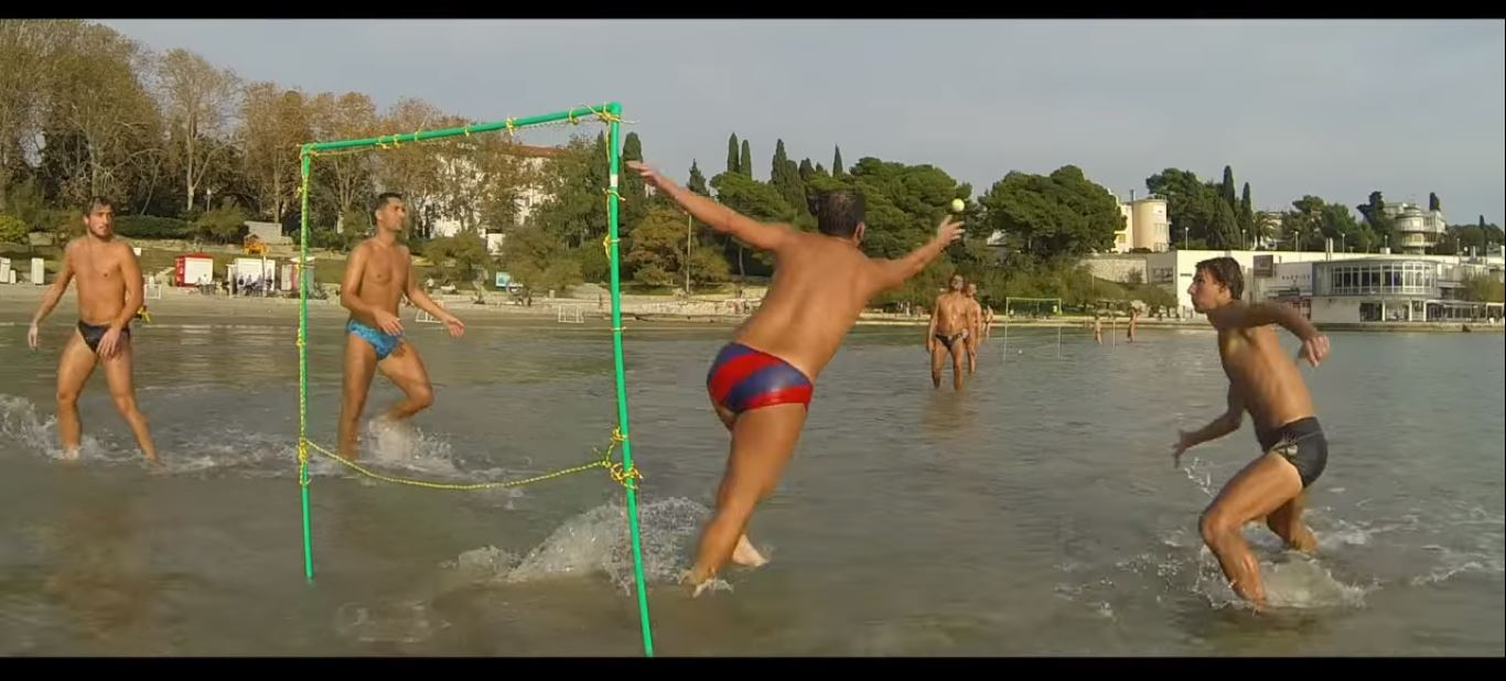 Picigol - picigin s golovima na splitskoj plaži Bačvice.